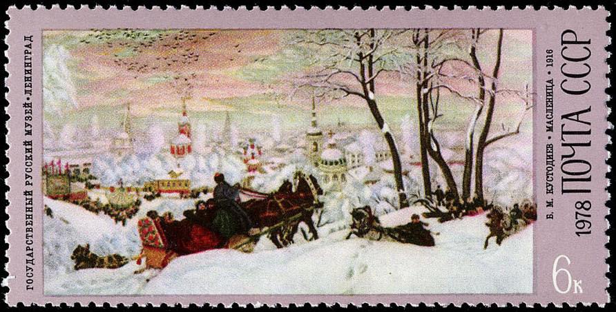 Б. М. Кустодиев. «Масленица». 1916 г.